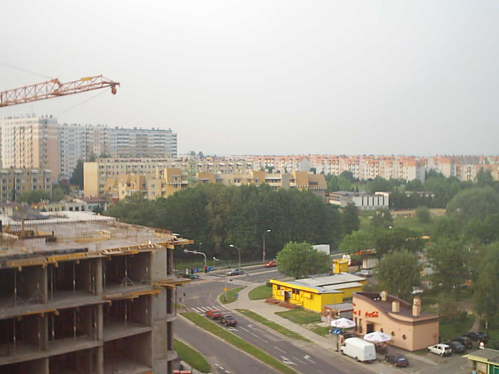 Zdjęcie Baranówki 4 z bloku na Baranówce 3 (ul. Ofiar Katynia 21)